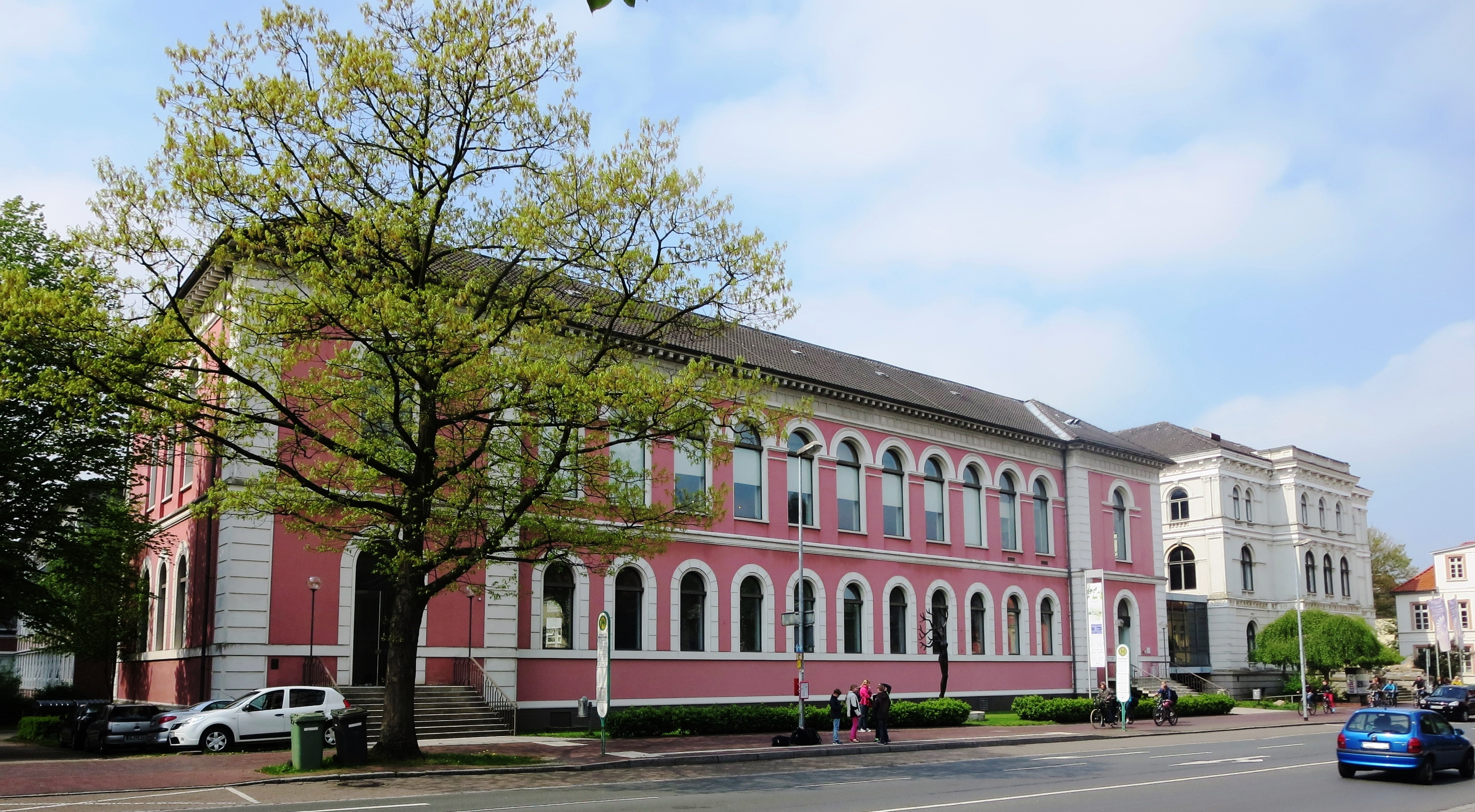 Landesmuseum Natur und Mensch in 26135 Oldenburg, Damm 38-44